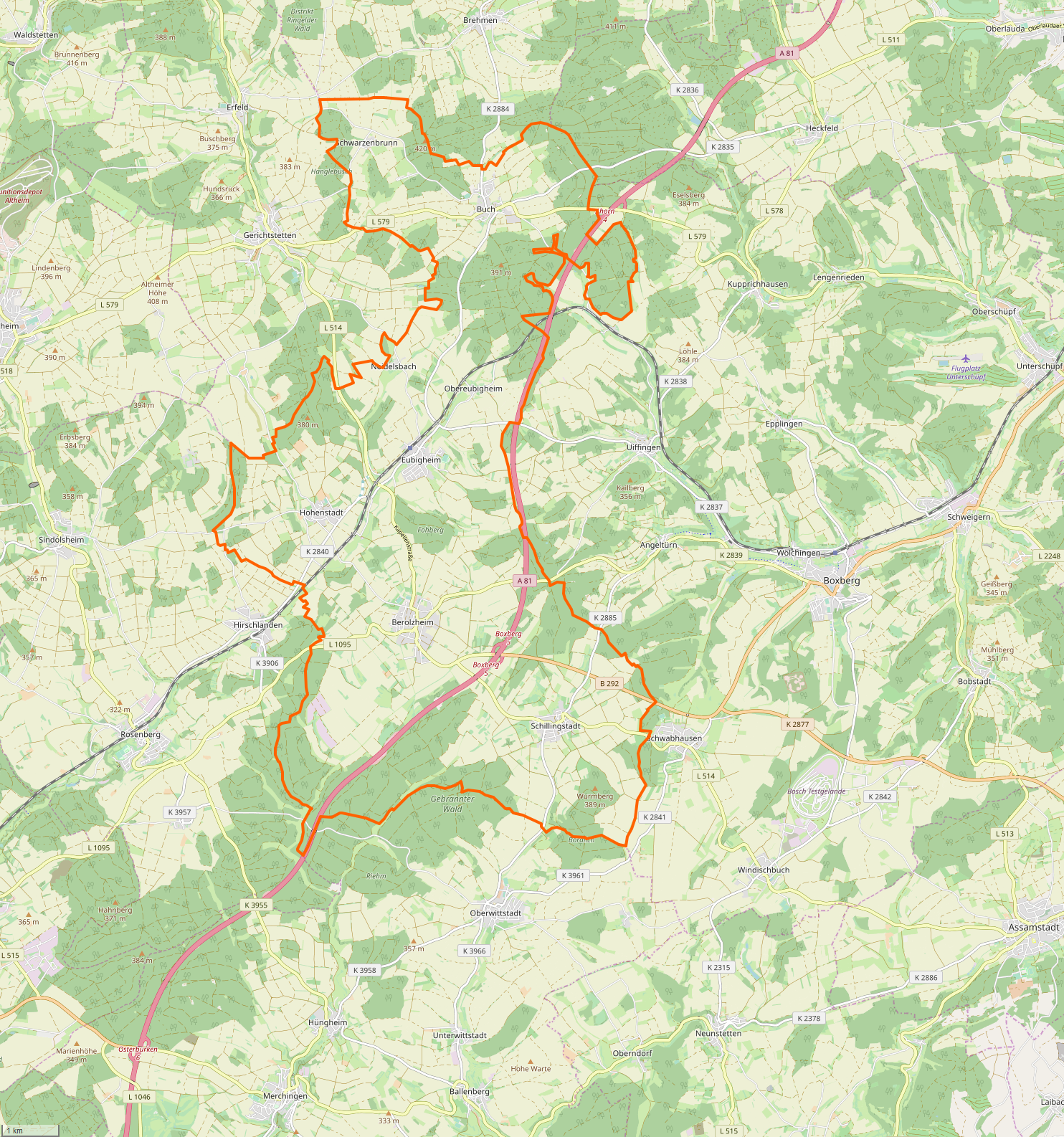 Gemarkung und Lage der Gemeinde Ahorn (Baden). Siehe auch: Liste der Kulturdenkmale in Ahorn (Baden). Liste der Straßennamen von Ahorn (Baden). Gemarkungen und Lagen der Städte und sonstigen Gemeinden im Main-Tauber-Kreis: Ahorn · Assamstadt · Bad Mergentheim · Boxberg · Creglingen · Freudenberg · Großrinderfeld · Grünsfeld · Igersheim · Königheim · Külsheim · Lauda-Königshofen · Niederstetten · Tauberbischofsheim · Weikersheim · Werbach · Wertheim · Wittighausen